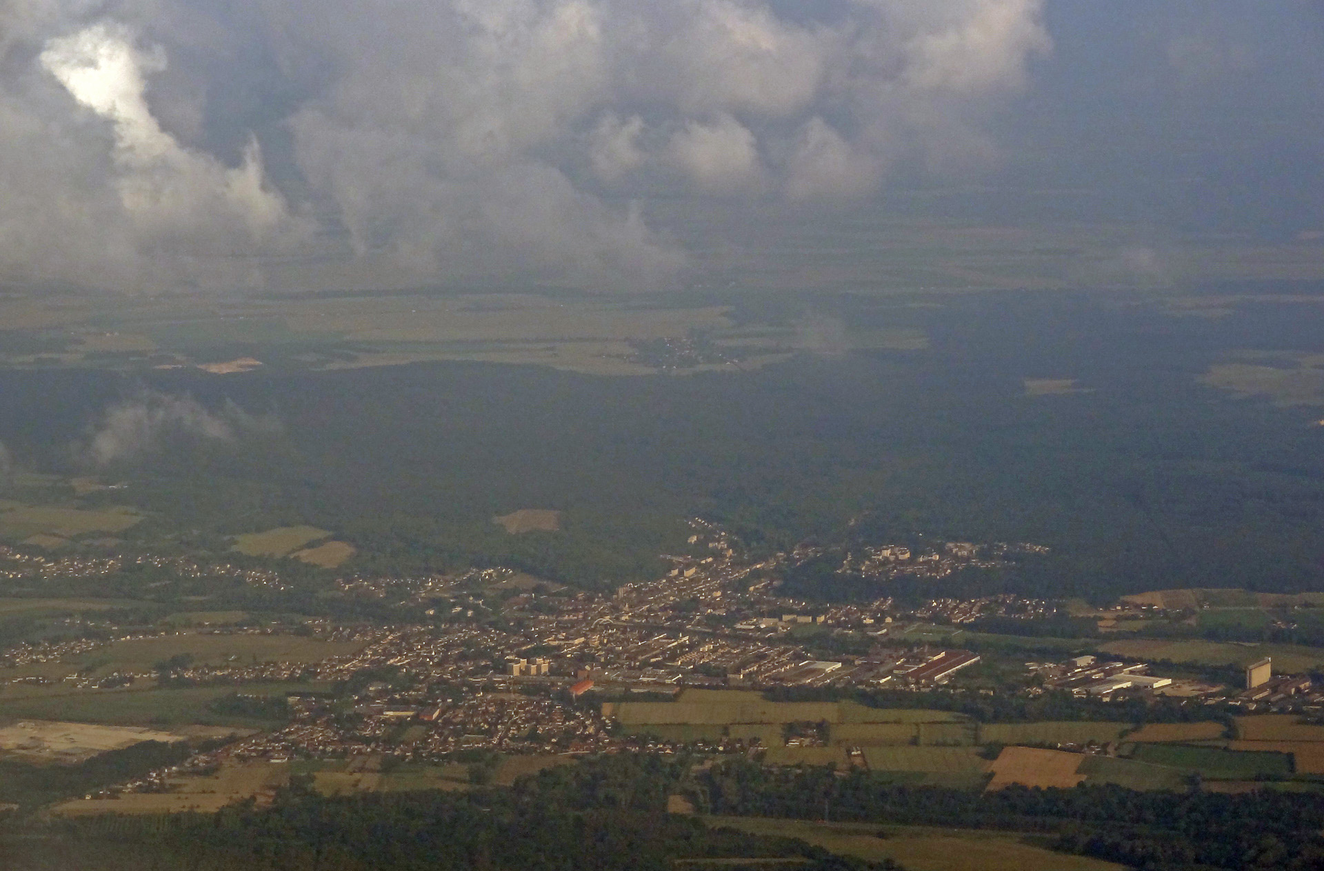 Vue aérienne de Pont-Sainte-Maxence et du nord-est de la forêt d'Halatte (Oise), France.